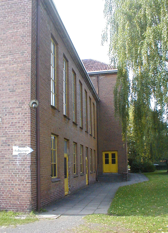 Das ehemalige Brechergebäude der Eisenerzgrube Porta in Minden-Uphausen bzw. Minden-Dützen, Nordrhein-Westfalen. Dieses Gebäude der stillgelegten Zeche ist heute Teil des Freizeitparks potts park.